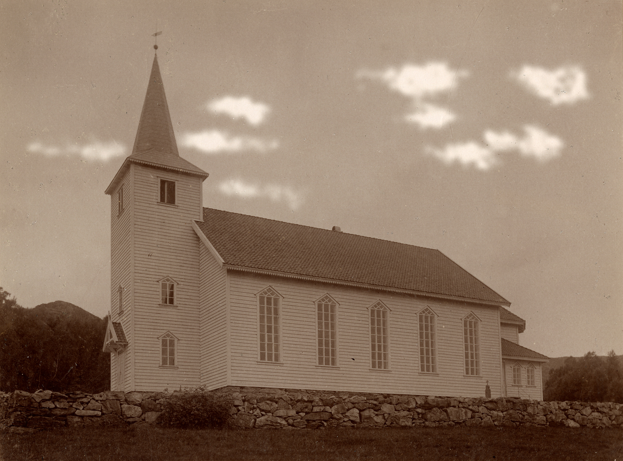 Skjold kirke fra 1887, som brant i 1992. Foto: Christian Christensen Thomhav, fra Kulturminnebilder.no.